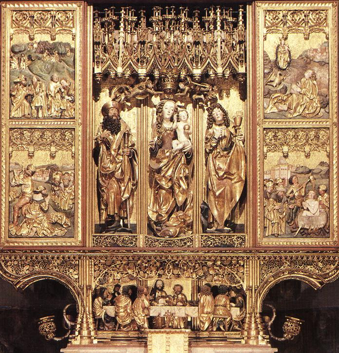 Detail hlavného oltára v Chráme svätého Jakuba v Levoči (dielo Majstra Pavla z Levoče z r. 1508 - 1510). Ide o najvyšší gotický oltár na svete (výška 18,62 m). Oltárnu skriňu vypĺňajú postavy Panny Márie, sv. Jakuba (vľavo) a sv. Jána Evanjelistu. Krídla oltára zachytávajú biblické scény: vľavo hore - Rozoslanie apoštolov do sveta, vľavo dole - Sťatie sv. Jakuba, vpravo hore - sv. Ján na ostrove Patmos, vpravo dole - Mučenie sv. Jána. V predele oltára súsošie Posledná večera